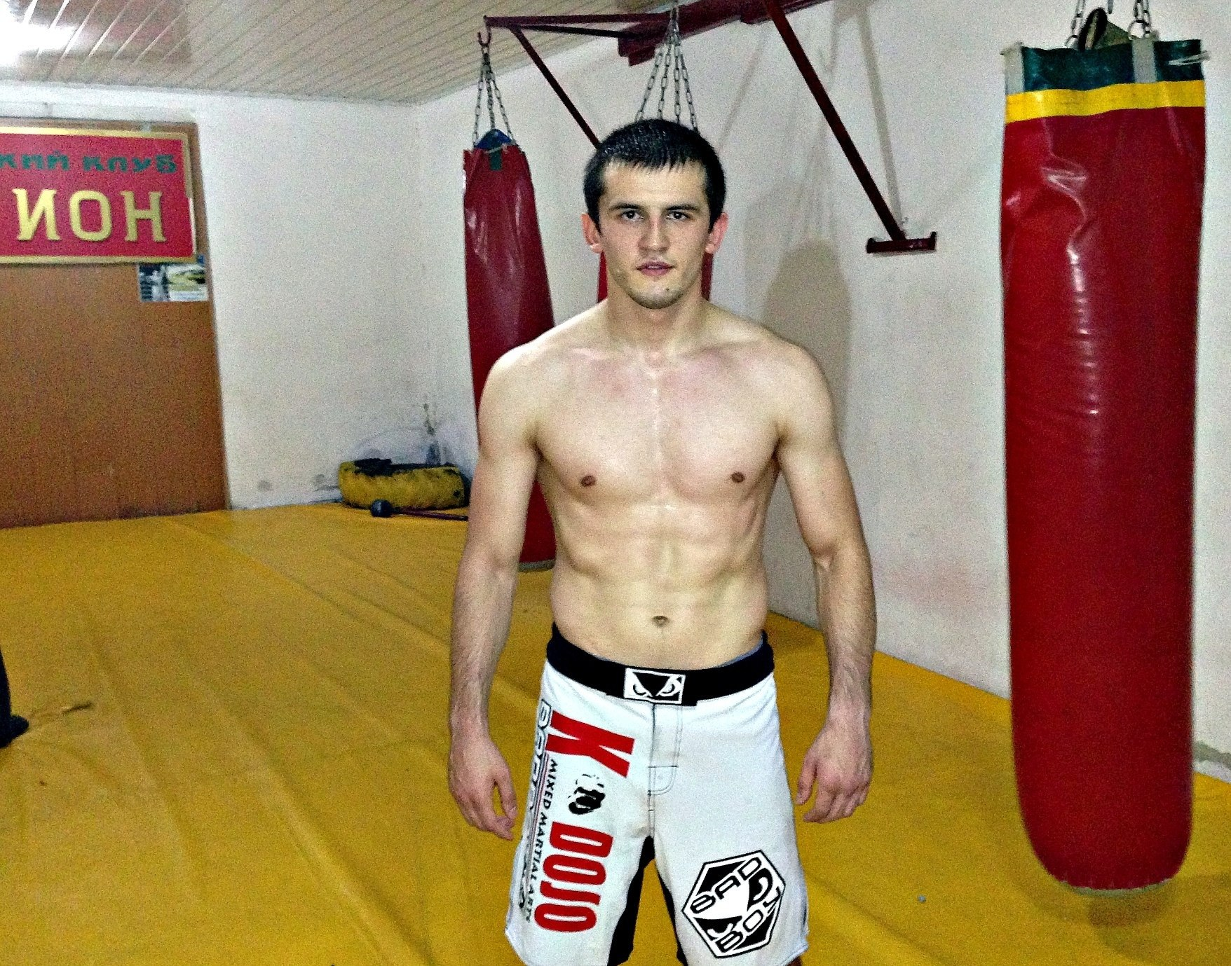 Альберт Туменов